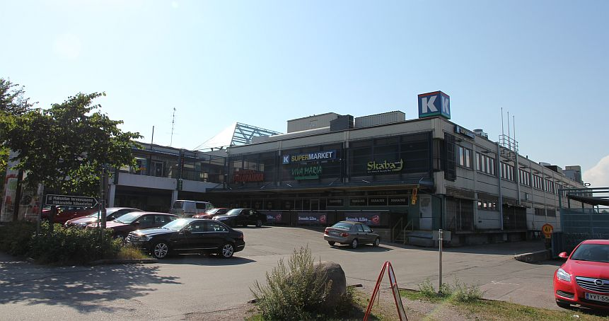 Vantaan Hakunilan ostoskeskus. Huom: Muista säilyttää viittaus kuvaajaan, mikäli käytät kuvaa.